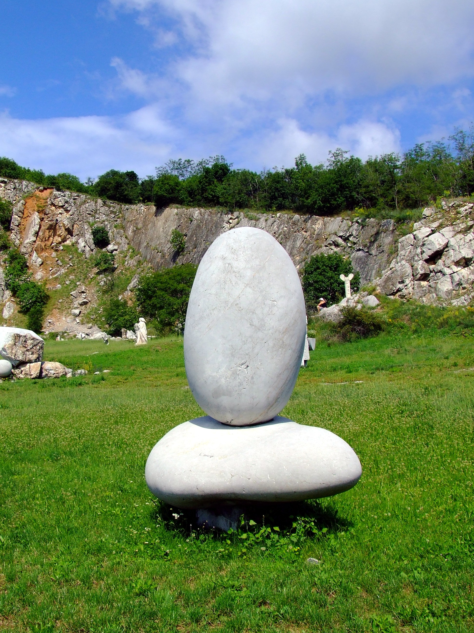 Bencsik István Negyedik című műve (szürke mészkő, 1973) a villányi (nagyharsányi) szabadtéri szoborparkban